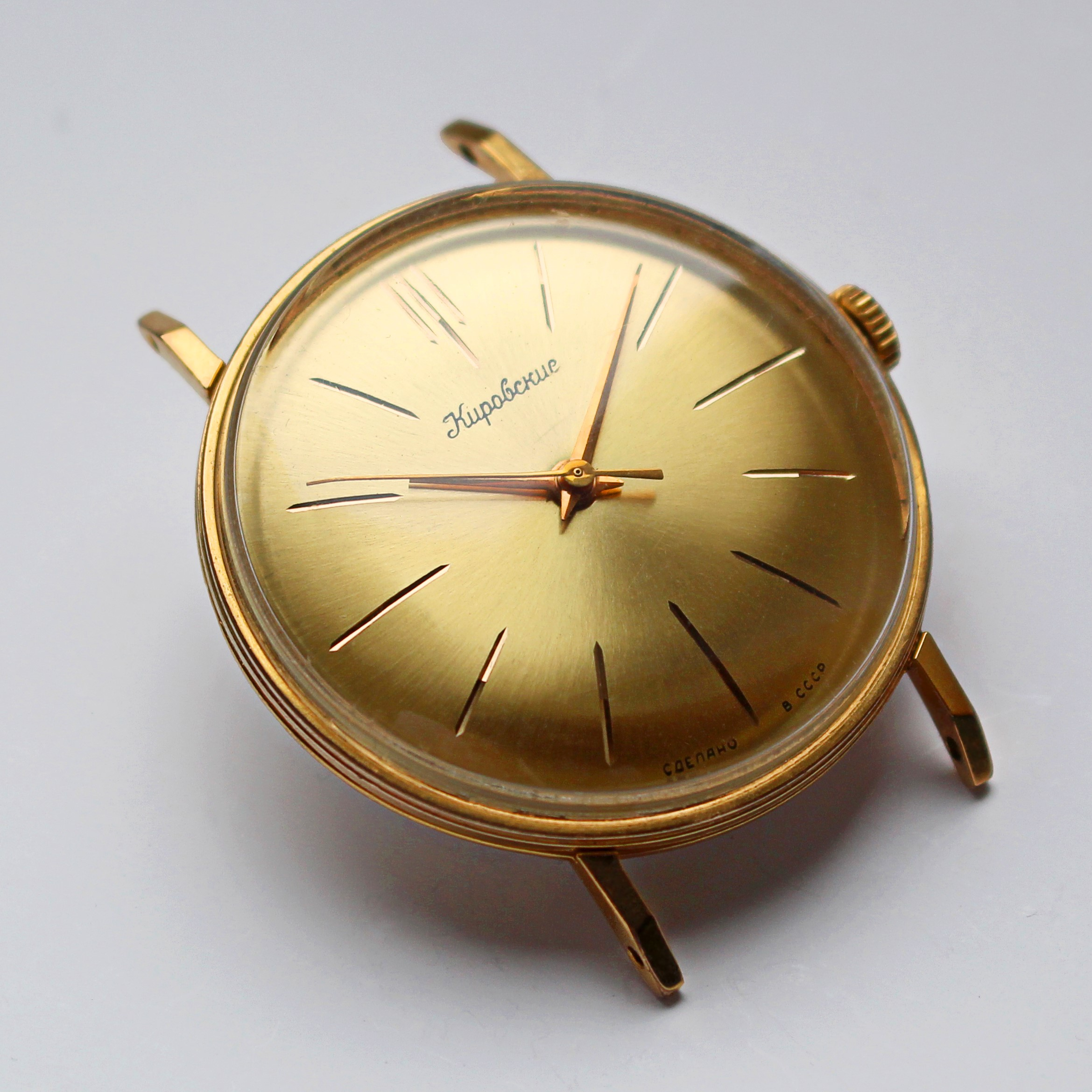 Kirovskije was the watch brand just before Poljot